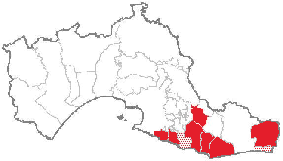 Mappa del territorio dei comuni aderenti all'unione di comuni, della provincia di Taranto, "Terre del Mare e del Sole"